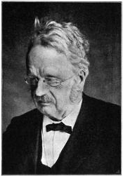 Den norske filologen Sophus Bugge.